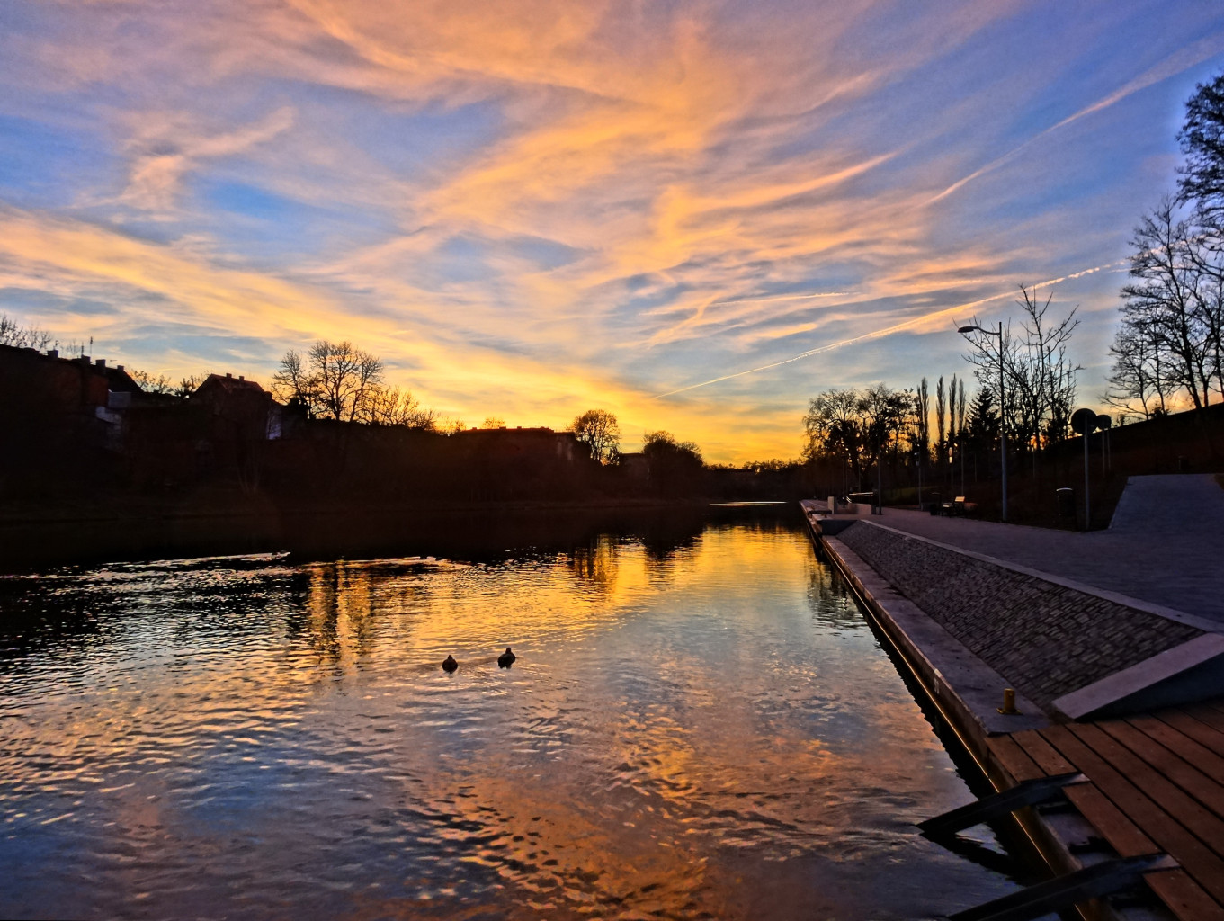 Brda w Bydgoszczy między mostami kolejowymi, a mostem Królowej Jadwigi